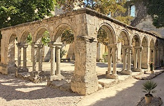 Le cloître des Cordeliers, à Saint-Emilion (France), classé UNESCO